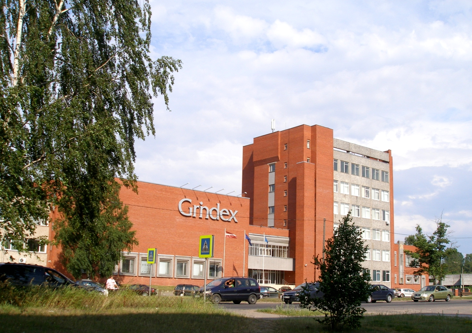 Façade de l'entreprise pharmaceutique Grindeks dans le voisinage de Šķirotava, rue Krustpils à Riga (Lettonie). Photo de Jānis Vilniņš. 2010.